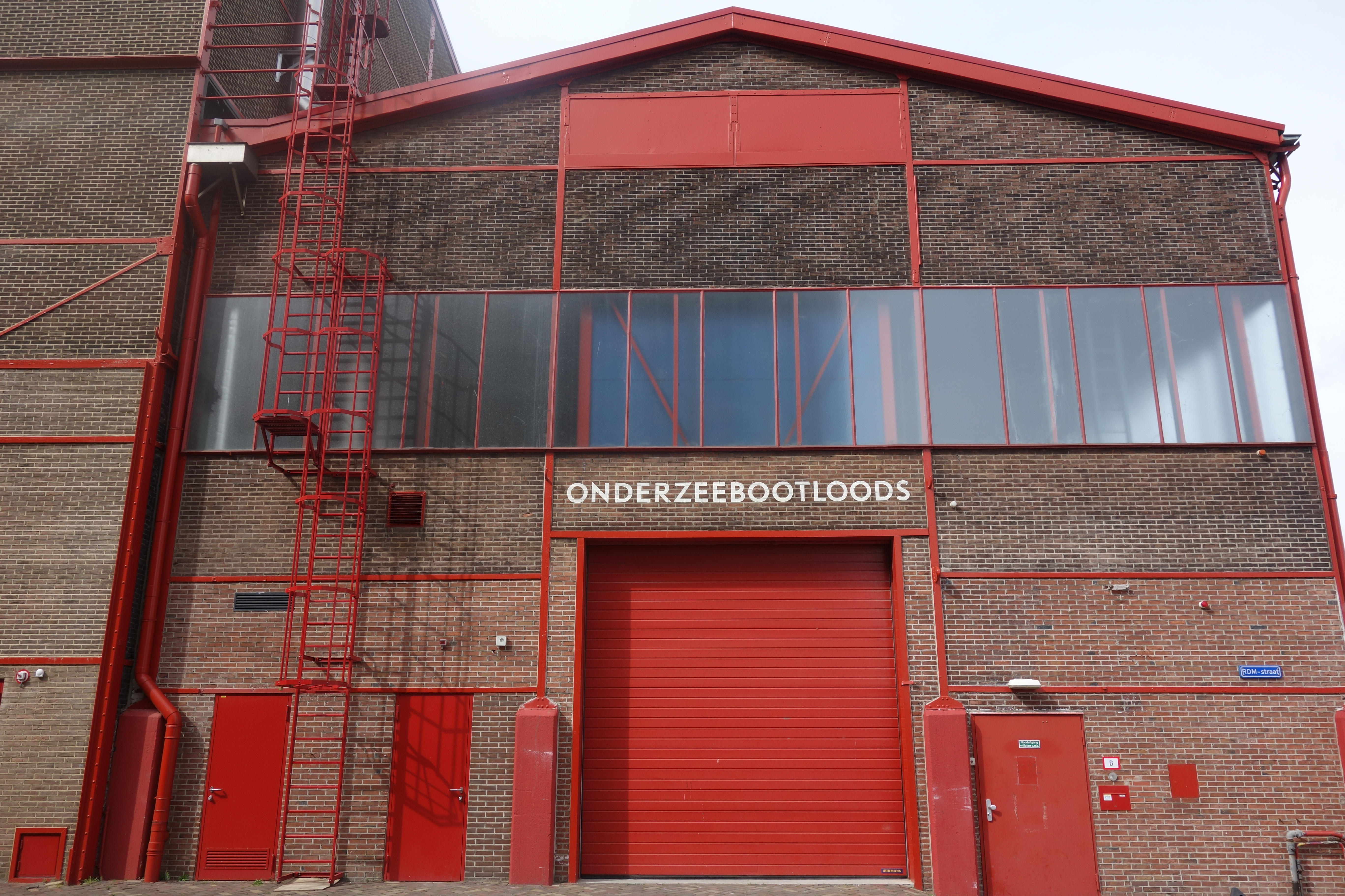 Vroegere onderzeebootloods van de RDM (Heijplaat, Rotterdam, 2017)